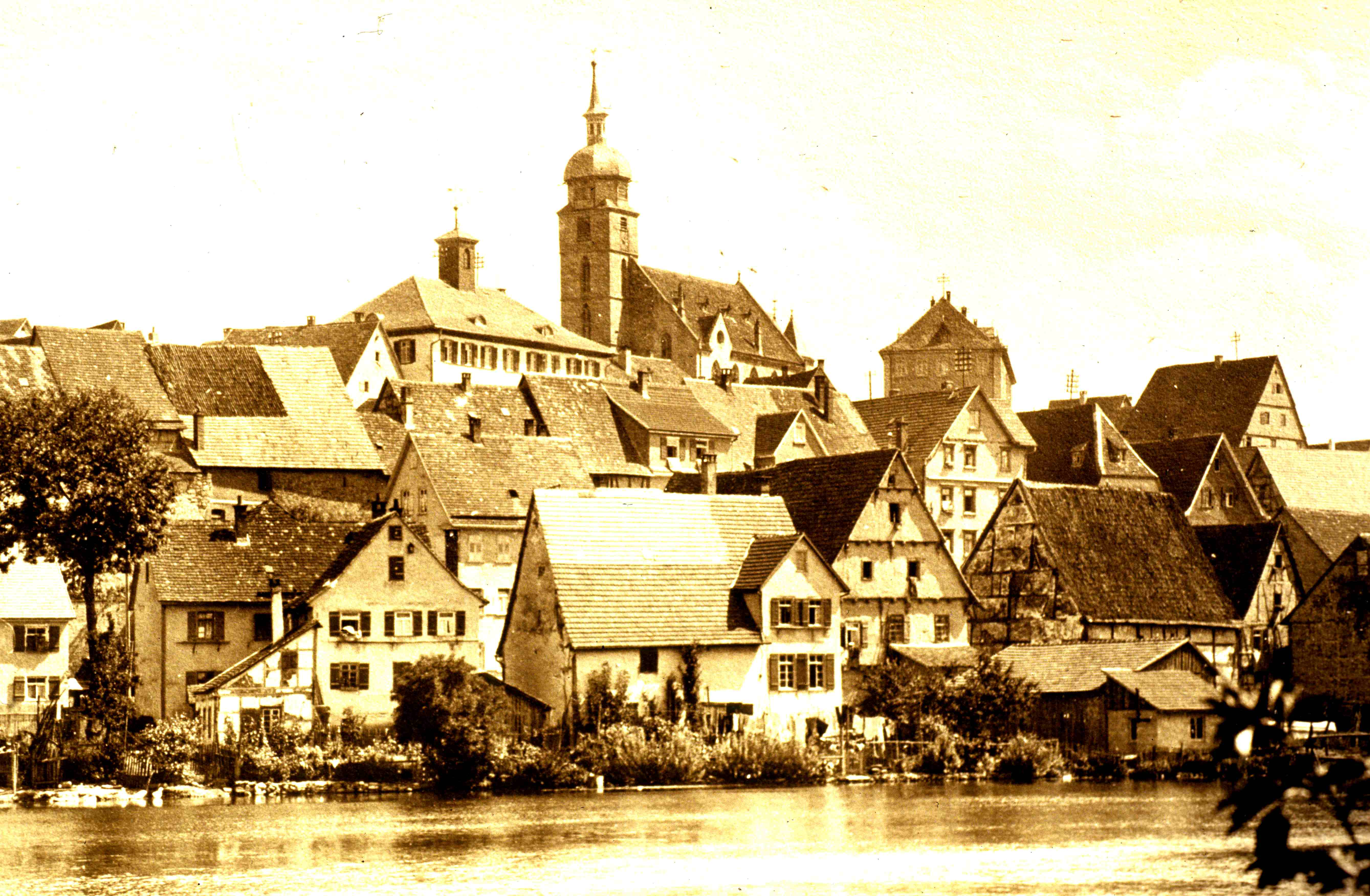 Zentrum von Böblingen vor dem 2. Weltkrieg